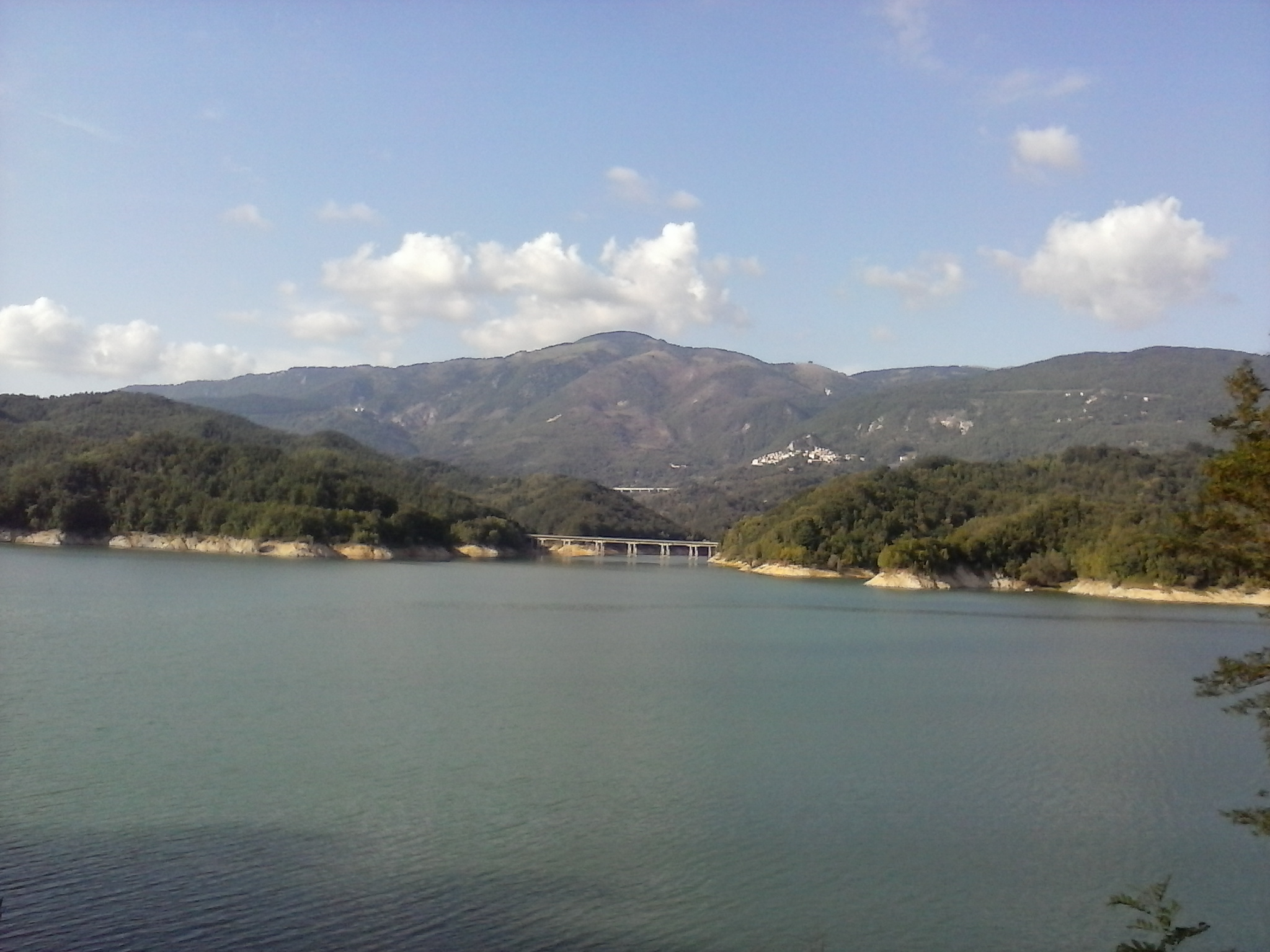 Il lago del Salto, in provincia di Rieti, fotografato dalla sponda meridionale. Sulla collina è visibile il paese di Petrella Salto. Sulla sponda si vede un ponte della strada provinciale 67, che costeggia il lago; più in lontananza è appena visibile un viadotto della superstrada Rieti-Torano (SS 578 Salto Cicolana).